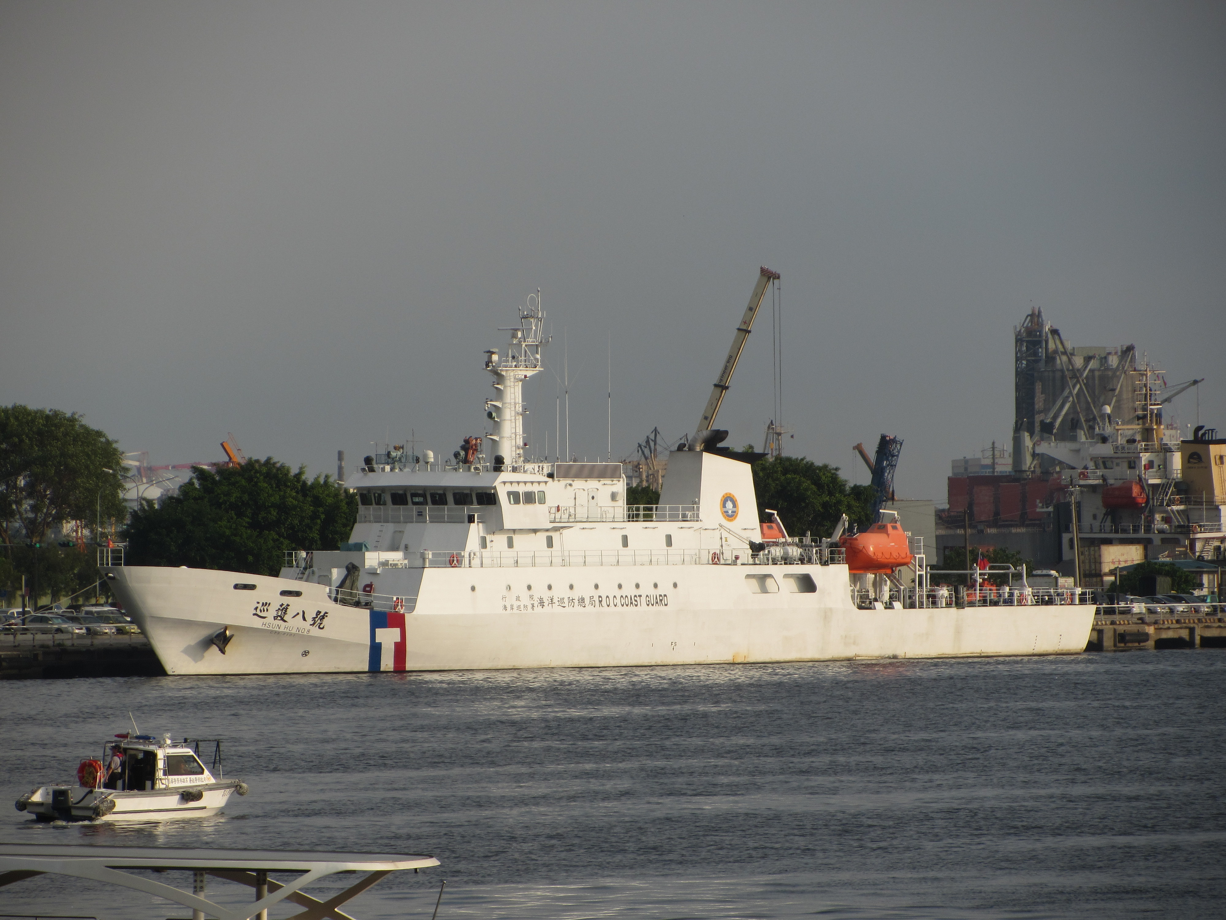 行政院海岸巡防署海洋巡防總局巡護八號艦